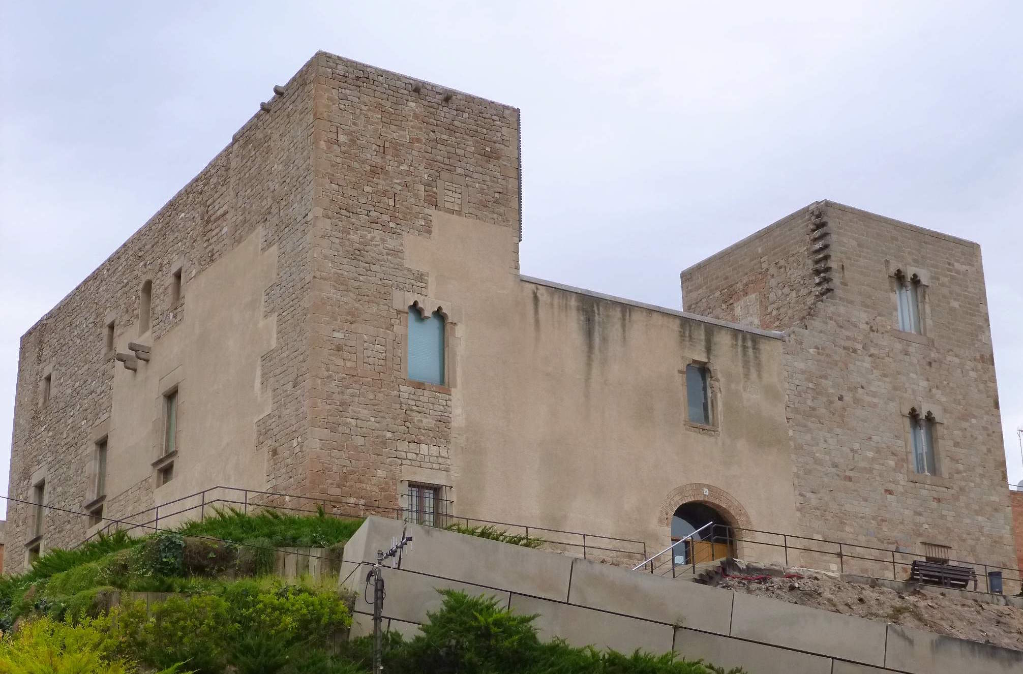 Castillo de Cornellà de Llobregat.